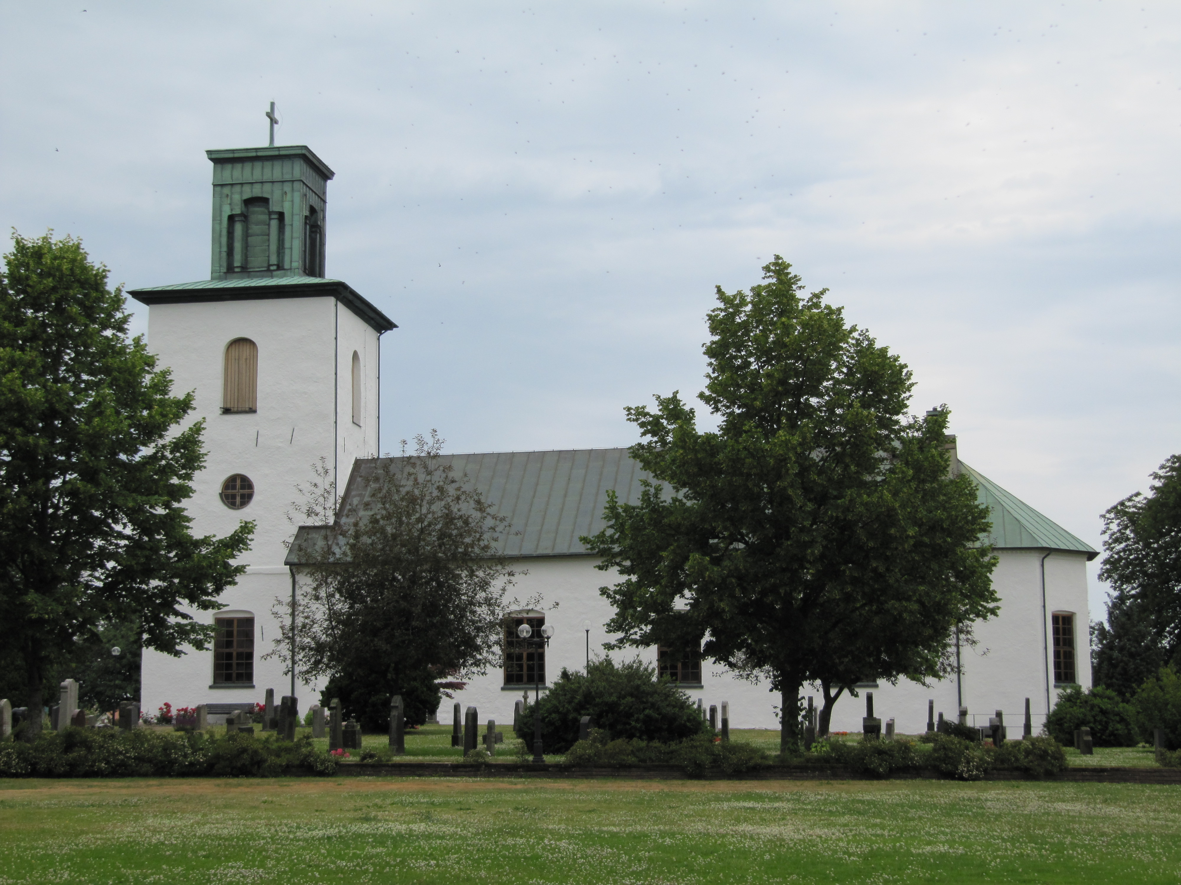 Grevie kyrka